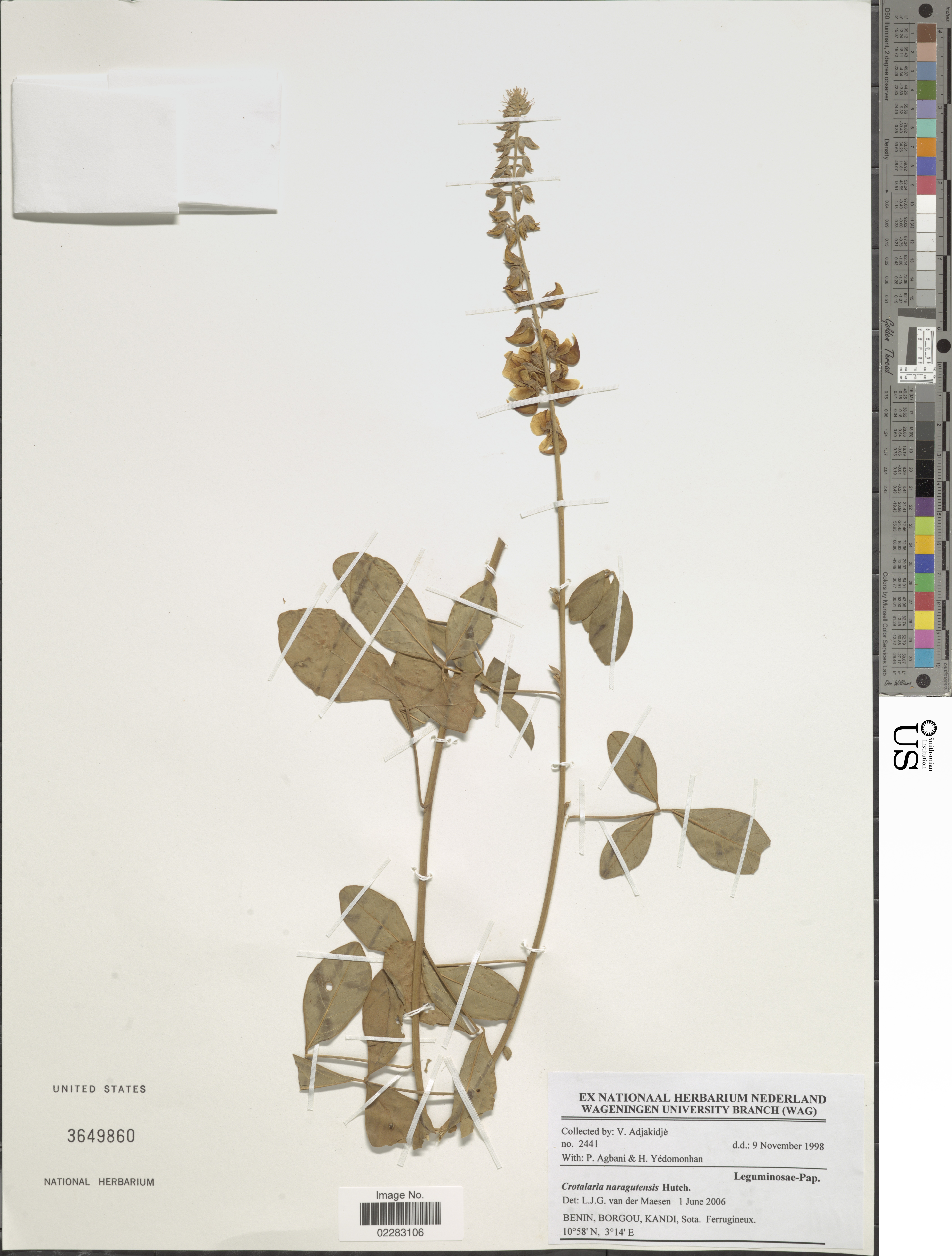 Crotalaria naragutensis Hutch. Object Details Biogeographical Region 22 - West Tropical Africa Collector V. Adjakidjè P. Agbani H. Yedomonhan Record Last Modified 3 Jan 2018 Specimen Count 1 Collection Date 9 Nov 1998 Barcode 02283106 USNM Number 3649860 Place Kandi, Sota., Borgou, Benin, Africa Published Name Crotalaria naragutensis Hutch. Taxonomy Plantae Dicotyledonae Rosales Fabaceae Faboideae NMNH - Botany Dept. Record ID nmnhbotany_13303837 Usage of Metadata (Object Detail Text) CC0 GUID (Link to Original Record)